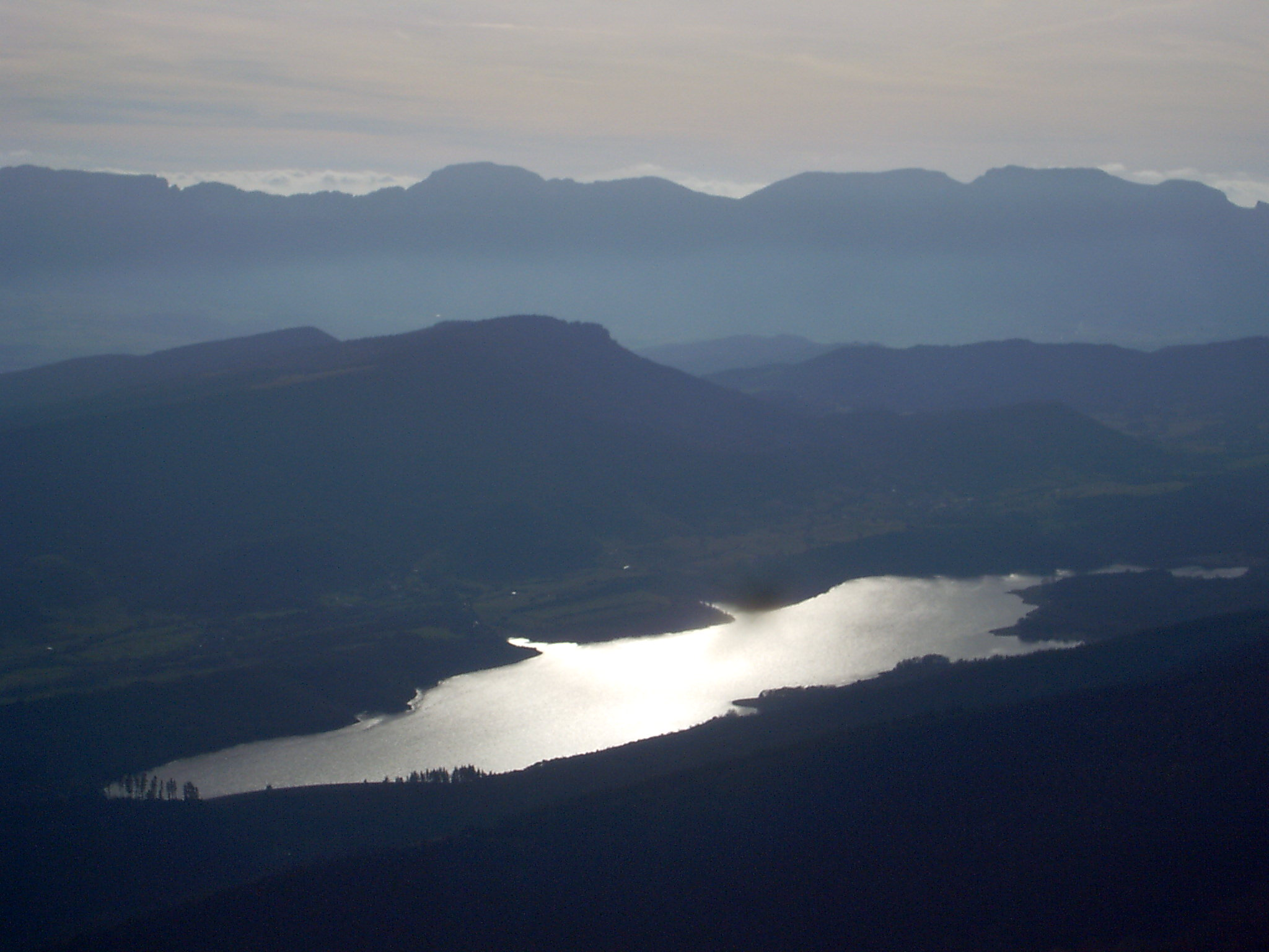 Embalse de Ordunte, Burgos.